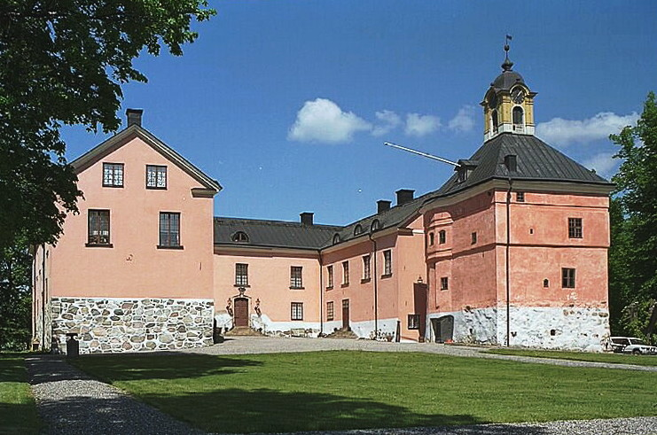 Rydboholms slott med Vasatornet till höger.